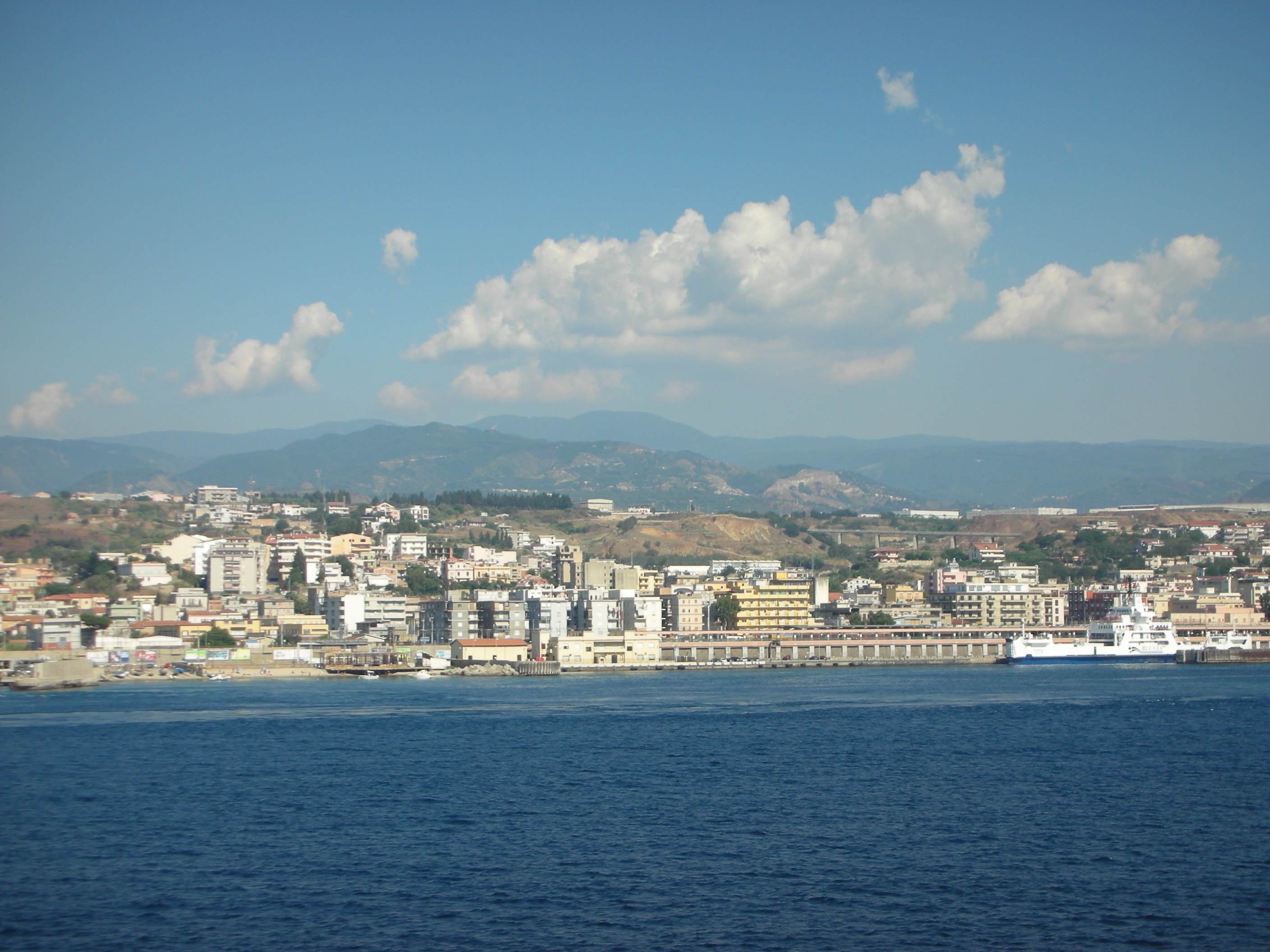 Messina, Sicilia, Italia